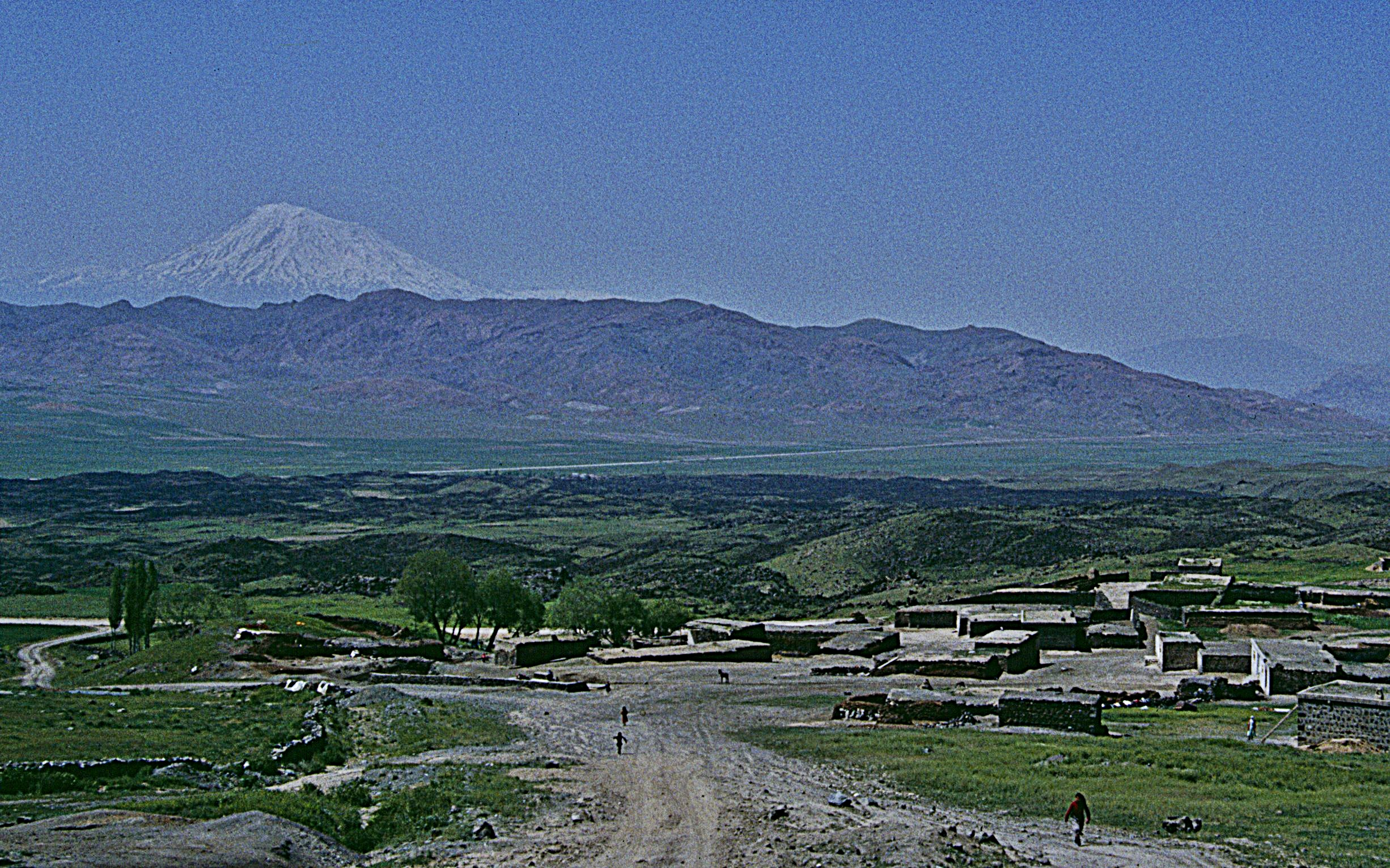 Kurdisches Dorf Cetenli mit Ararat